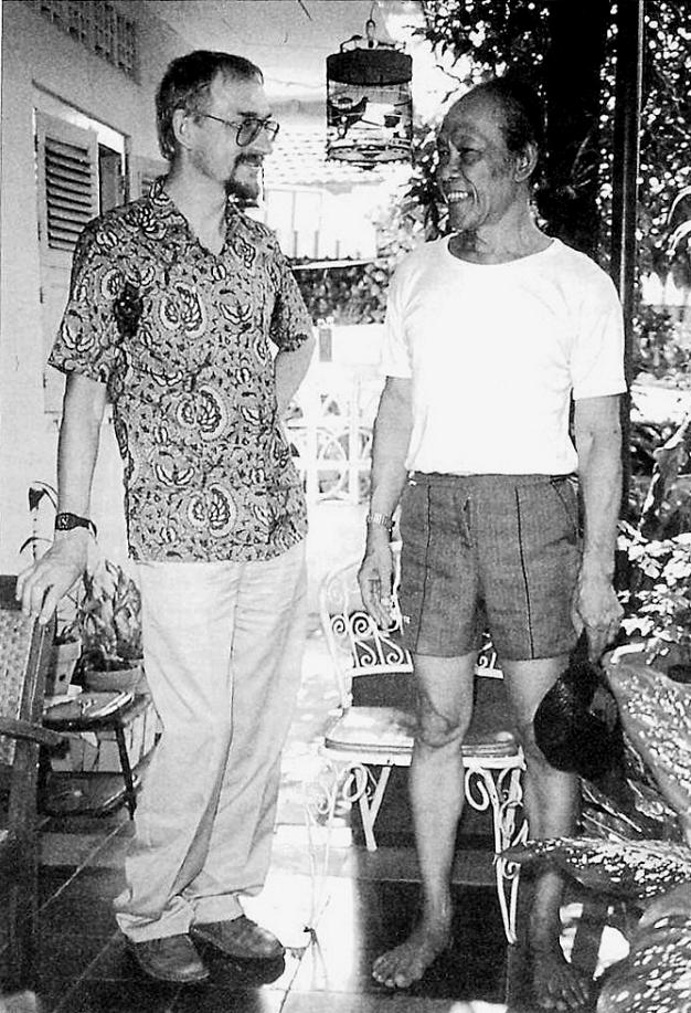 Rüdiger Siebert zu Gast bei Pramoedia Ananta Toer